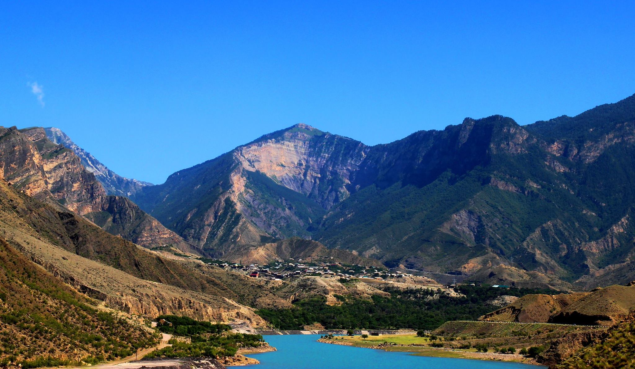 село Гимры. Лето 2015